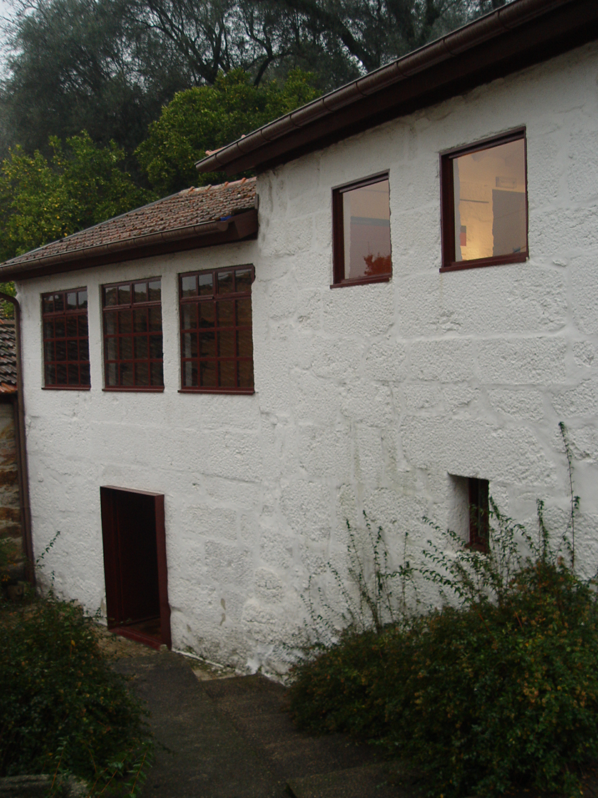 Gold Museum in Travassos Povoa de Lanhoso (Museu do Ouro)